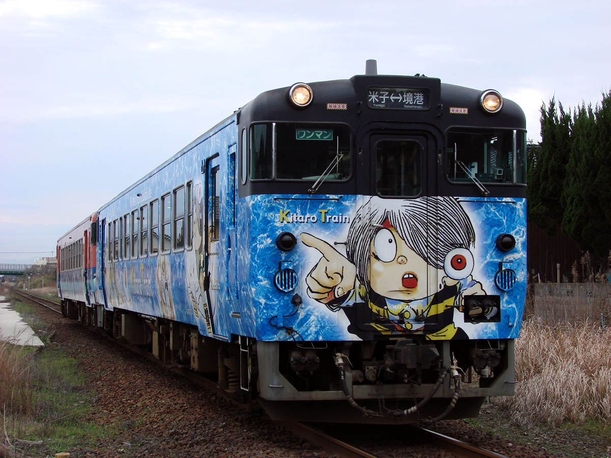 JR西日本 キハ40形（鬼太郎列車）